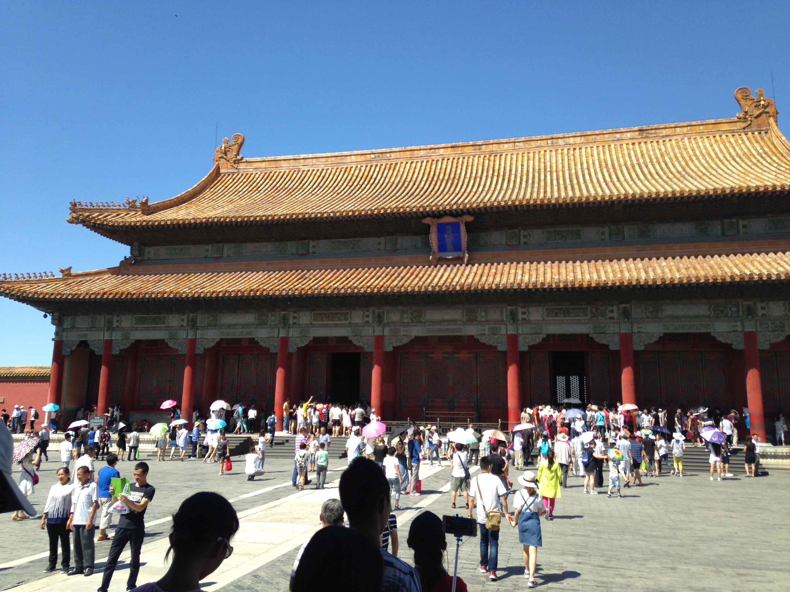 紫禁城・保和殿